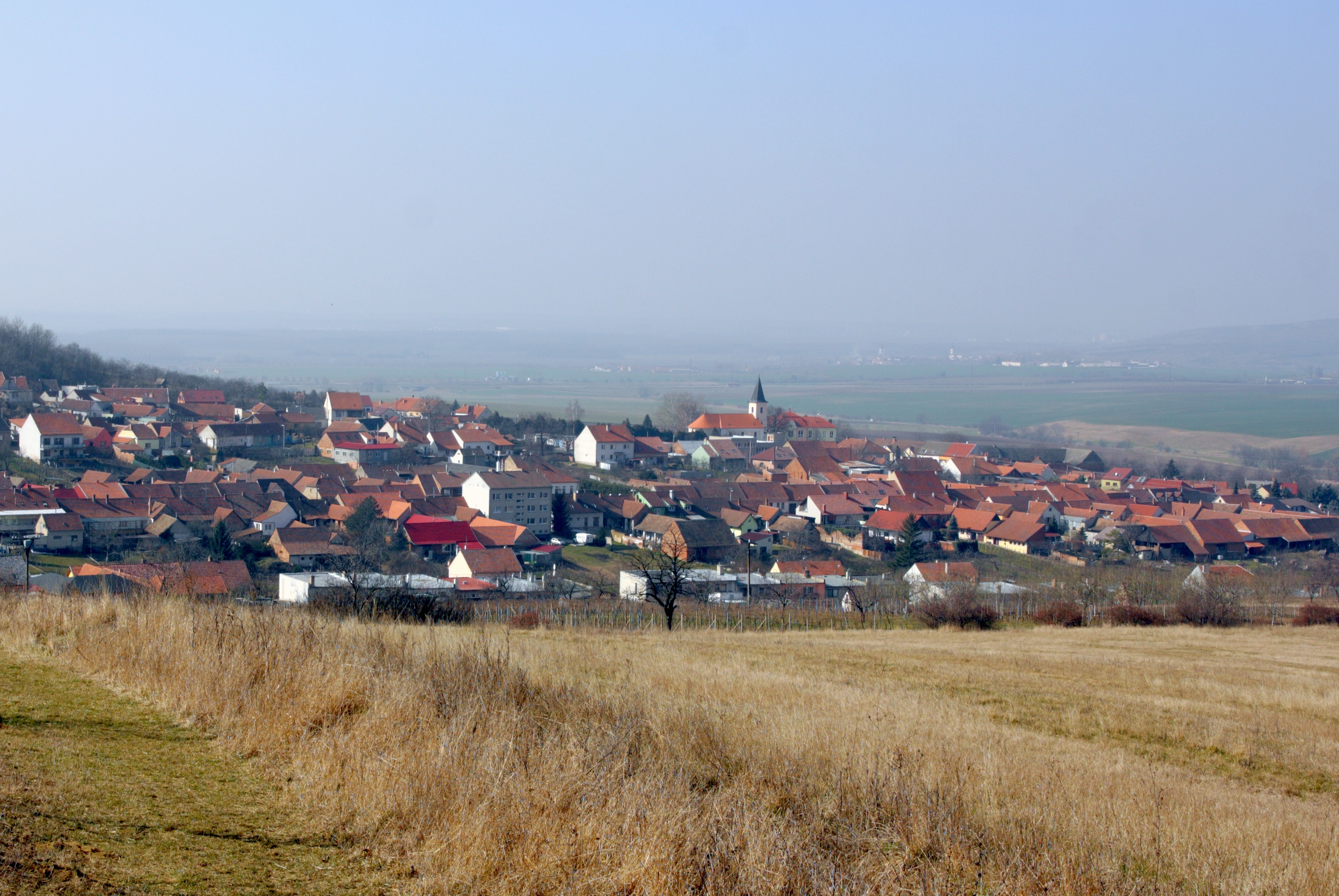 Křepice - pohled z Novosadů.